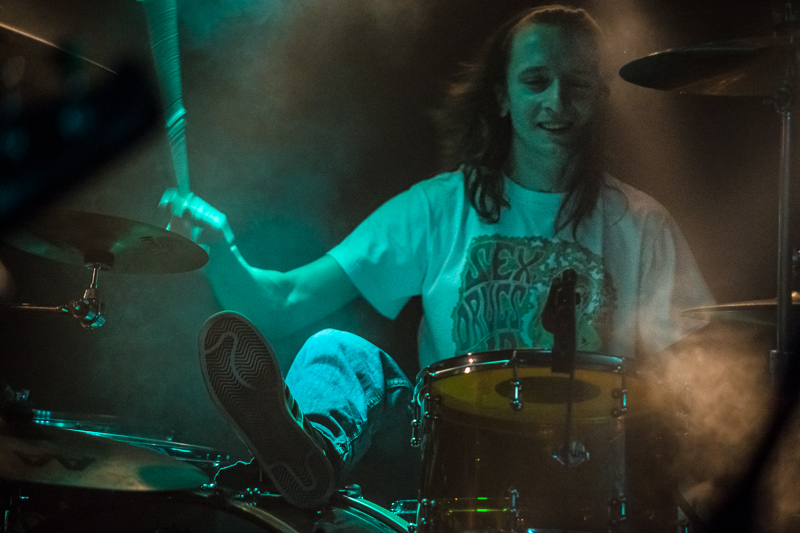 Paweł Jurkowski, perkusista zespołu Mech podczas koncertu charytatywnego Stefan Fest w klubie Fonobar w Warszawie, 1 maja 2013.